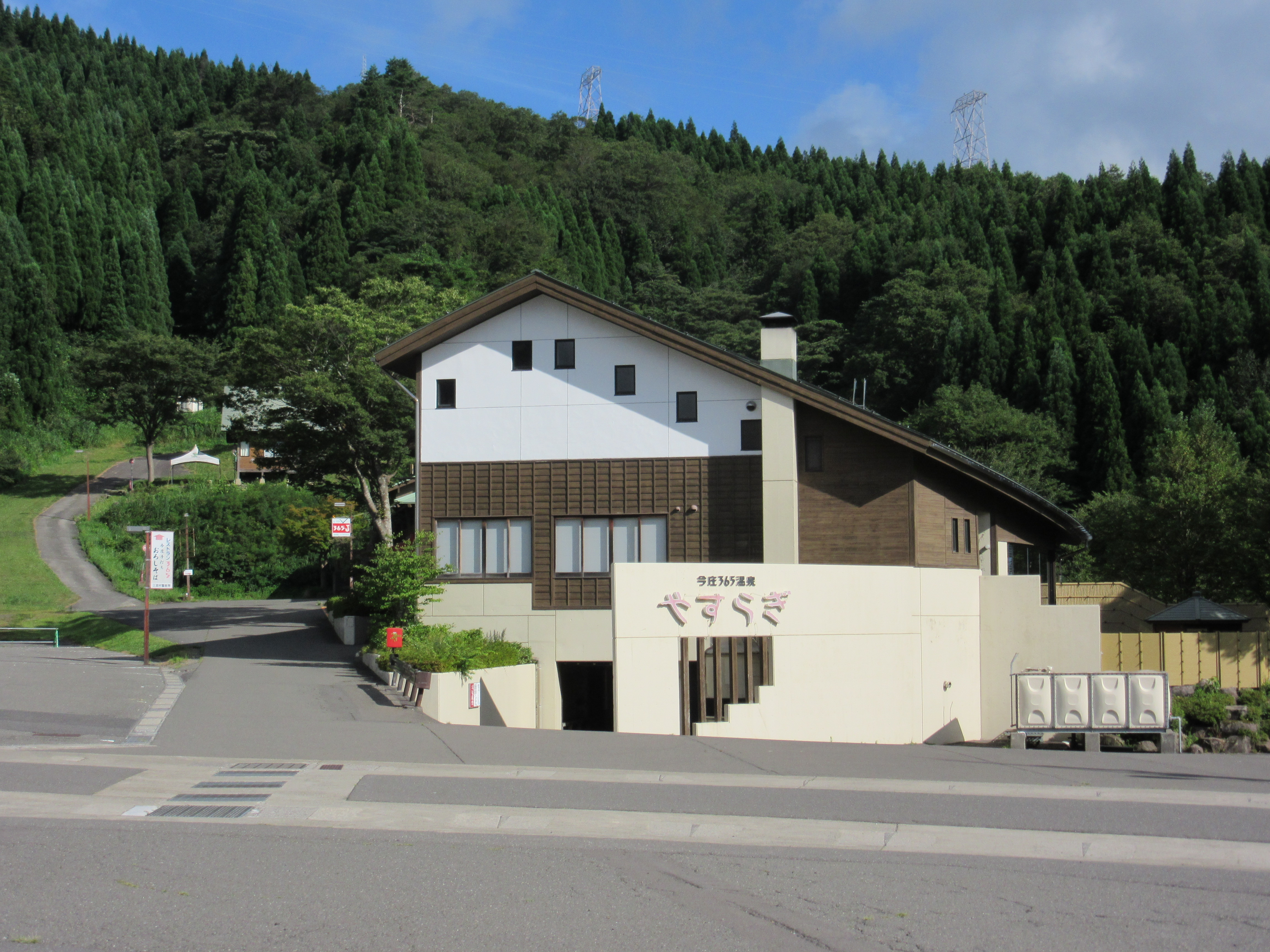 今庄365温泉